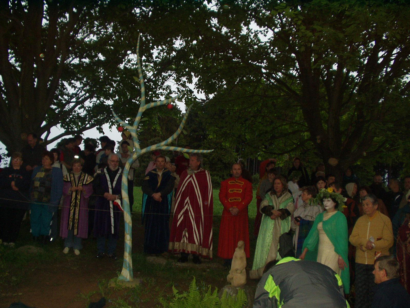 Lubo Kristek: Zrození, kov